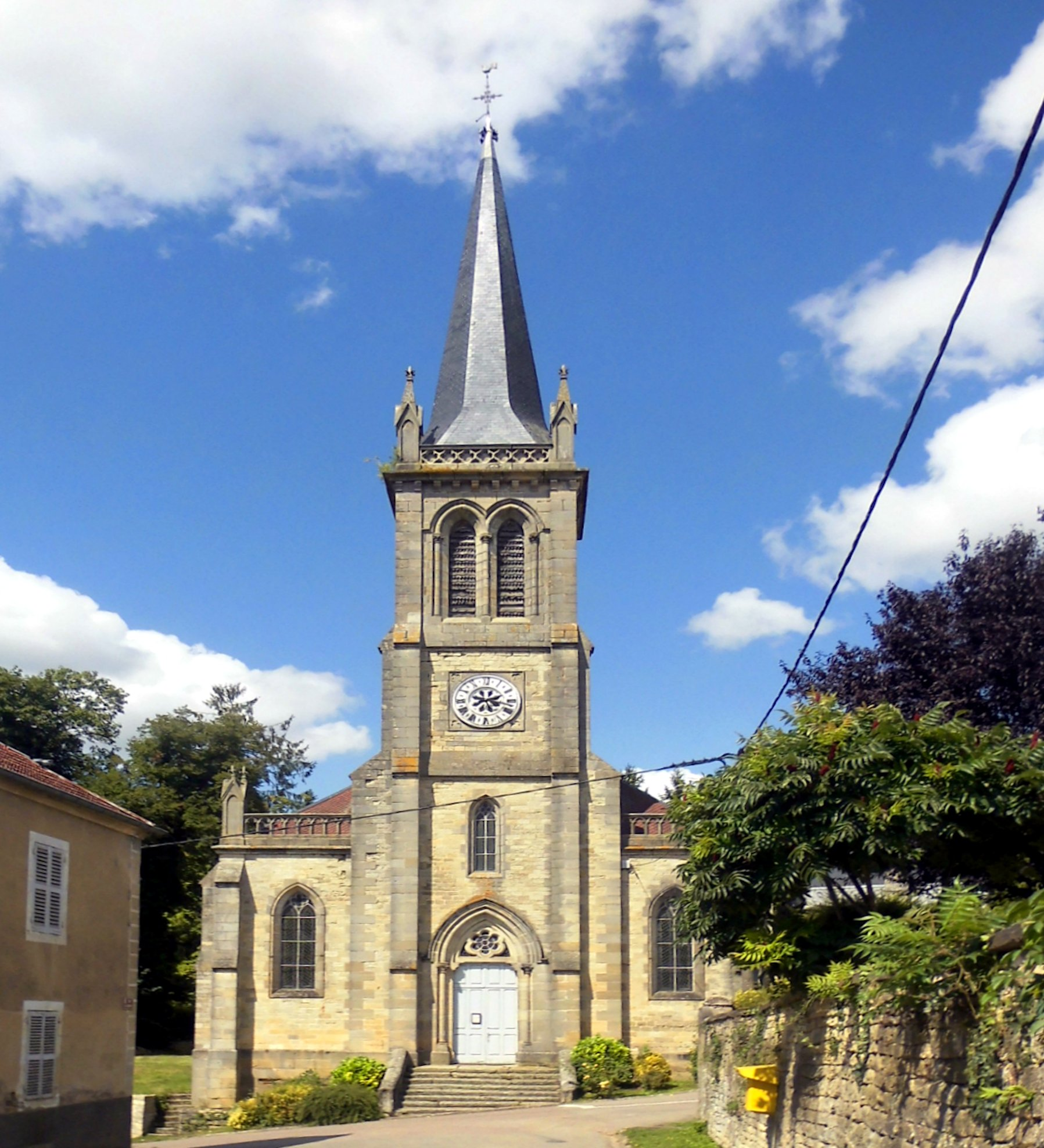 L'+eglise Saint-Julien d'Aisey, cpmmune d'Aisey-et-Richecourt